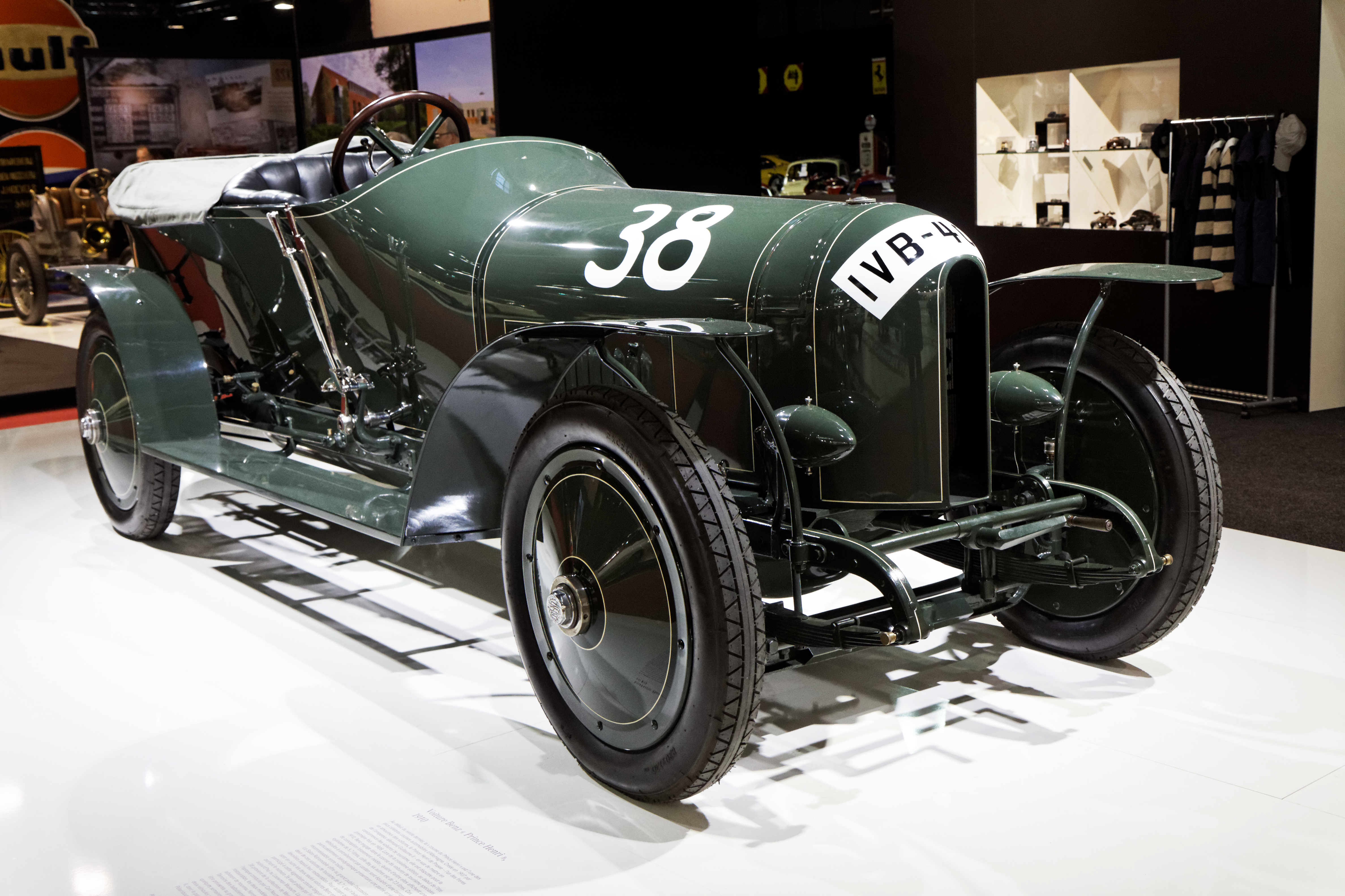 Une Mercedes-Benz Prince Henry présentée lors du salon retromobile 2013.